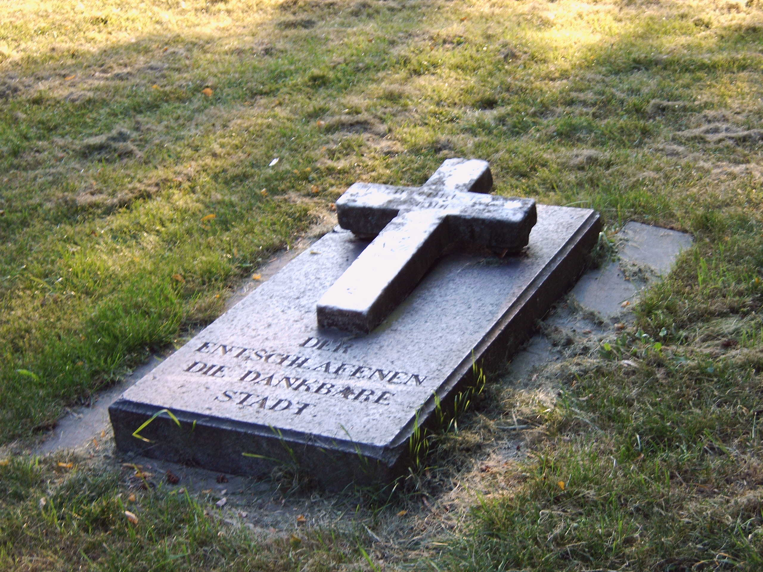 Grabstein von Maria Neide im Nordpark in Magdeburg